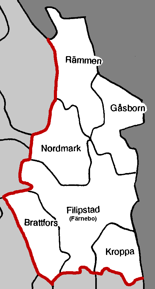 Old municipalities in Filipstad